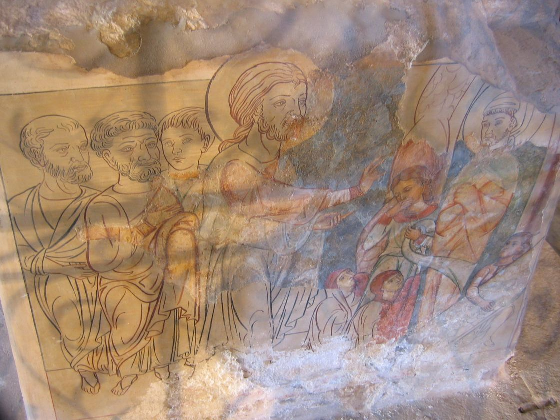 he:בית פגי